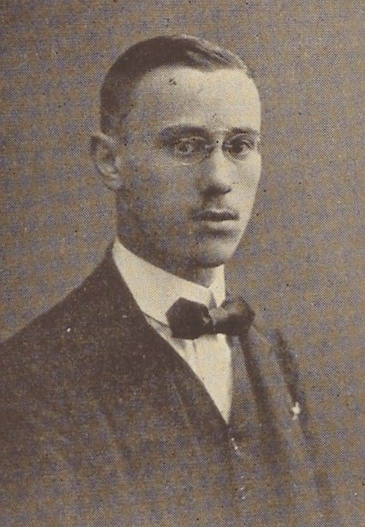 Partoprenantoj de UK 1912 el la albumo VIII. Universala Kongreso Esperantista.